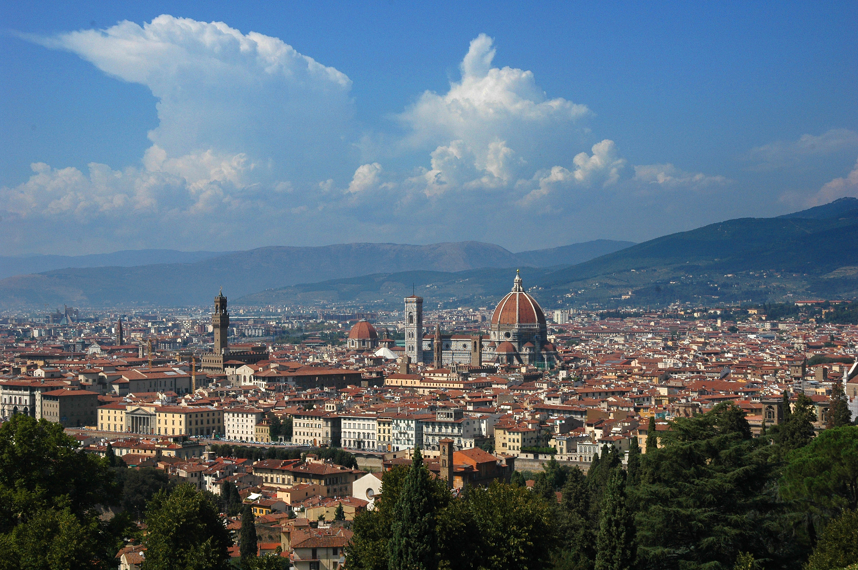 Florence and Santa Maria del Fiore